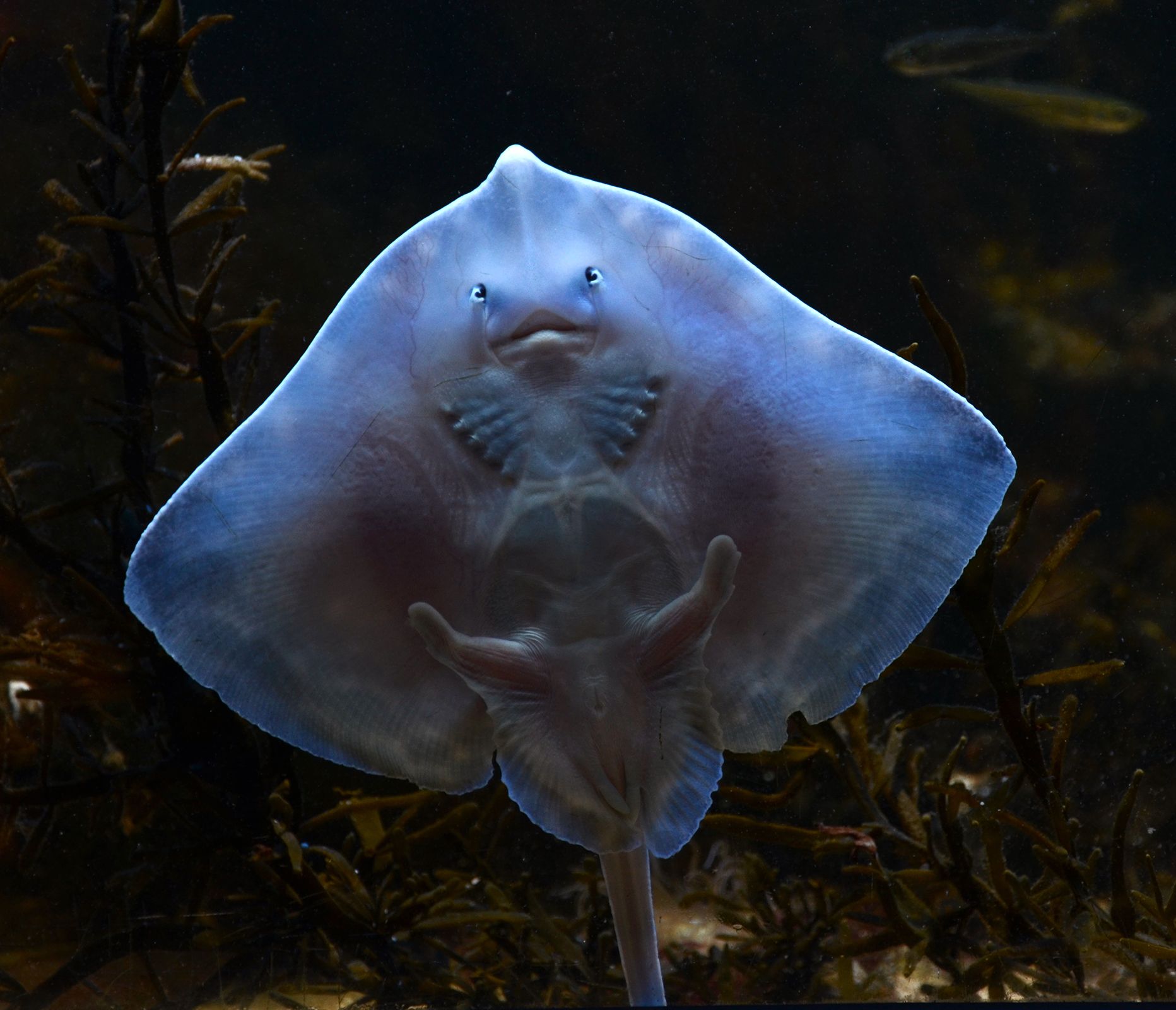 Raie bouclée (Raja clavata), aquarium de Vannes.